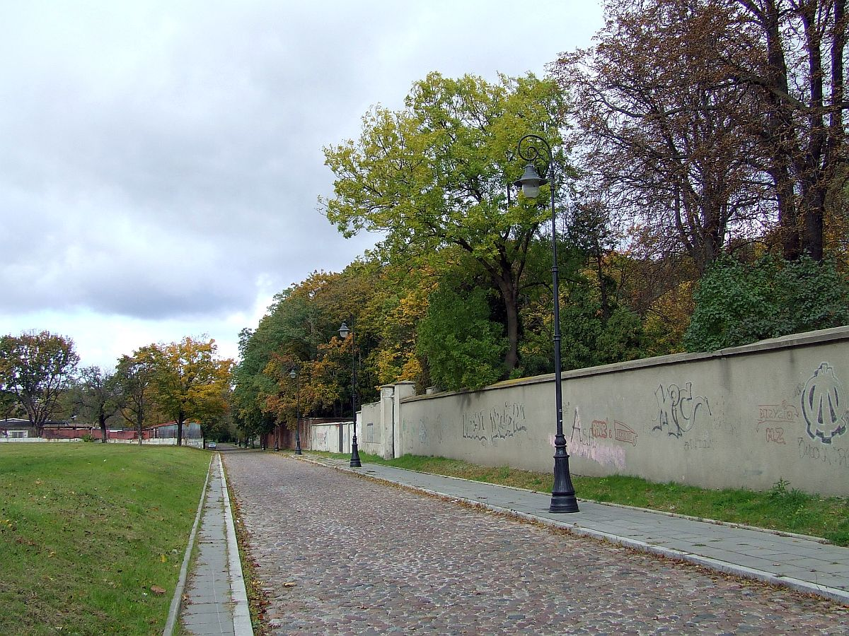 Muzułmański Cmentarz Kaukaski, Warsaw, Młynarska Street 60